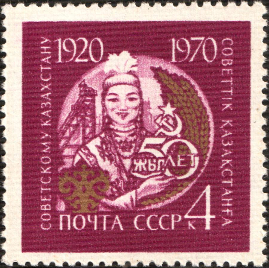 Briefmarke, Sowjetunion